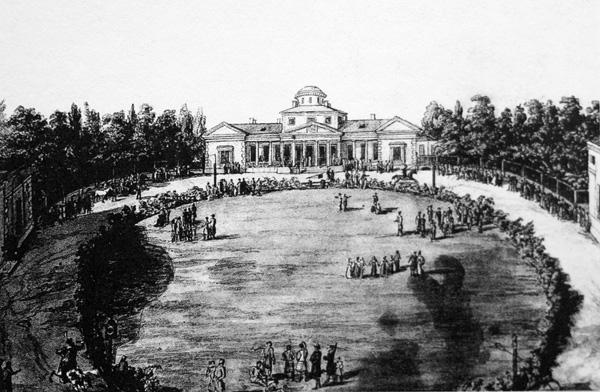 Murzinka Estate near St Petersburg